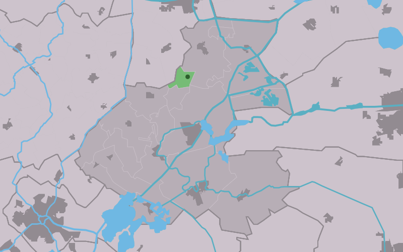 Kaartsje fan himrik fan Aegum